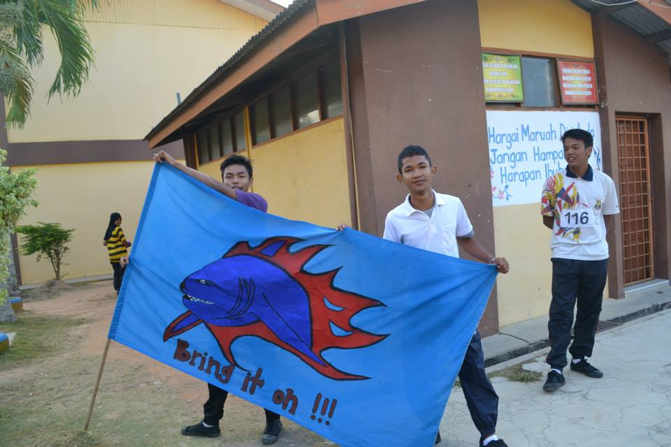 Rumah Biru SMK Undang Jelebu